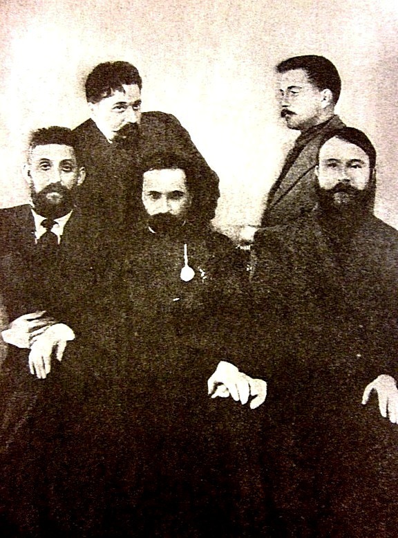 Георгий Гапон с группой рабочих накануне 9-го января 1905 г. Сидят: Иноземцев, Гапон, Филиппов. Стоят: Янов и Климов.